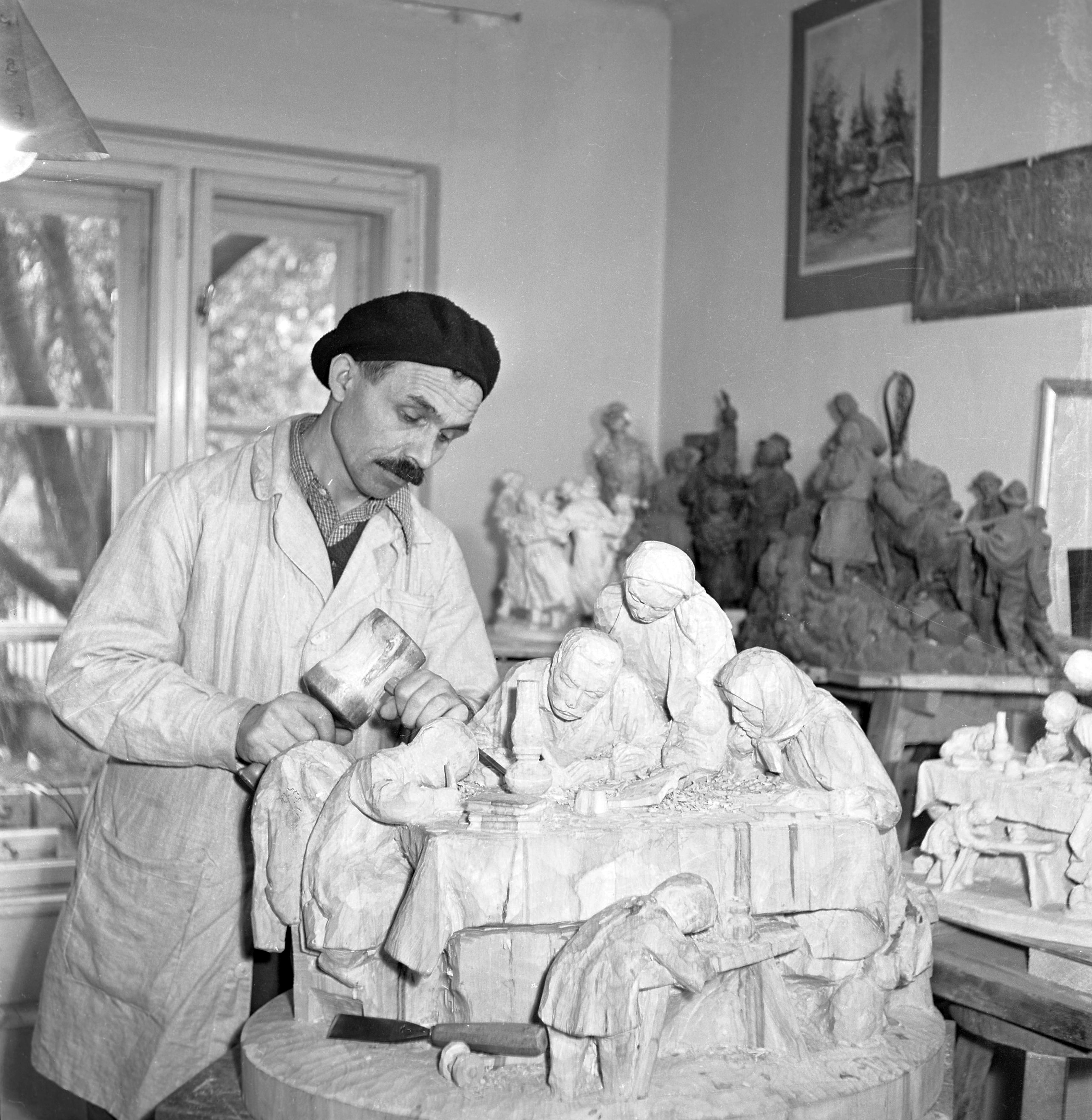 Василь Свида за роботою